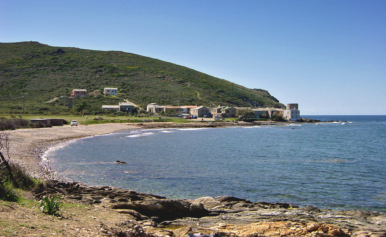 Ersa (Corsica) - Marine de Tollare